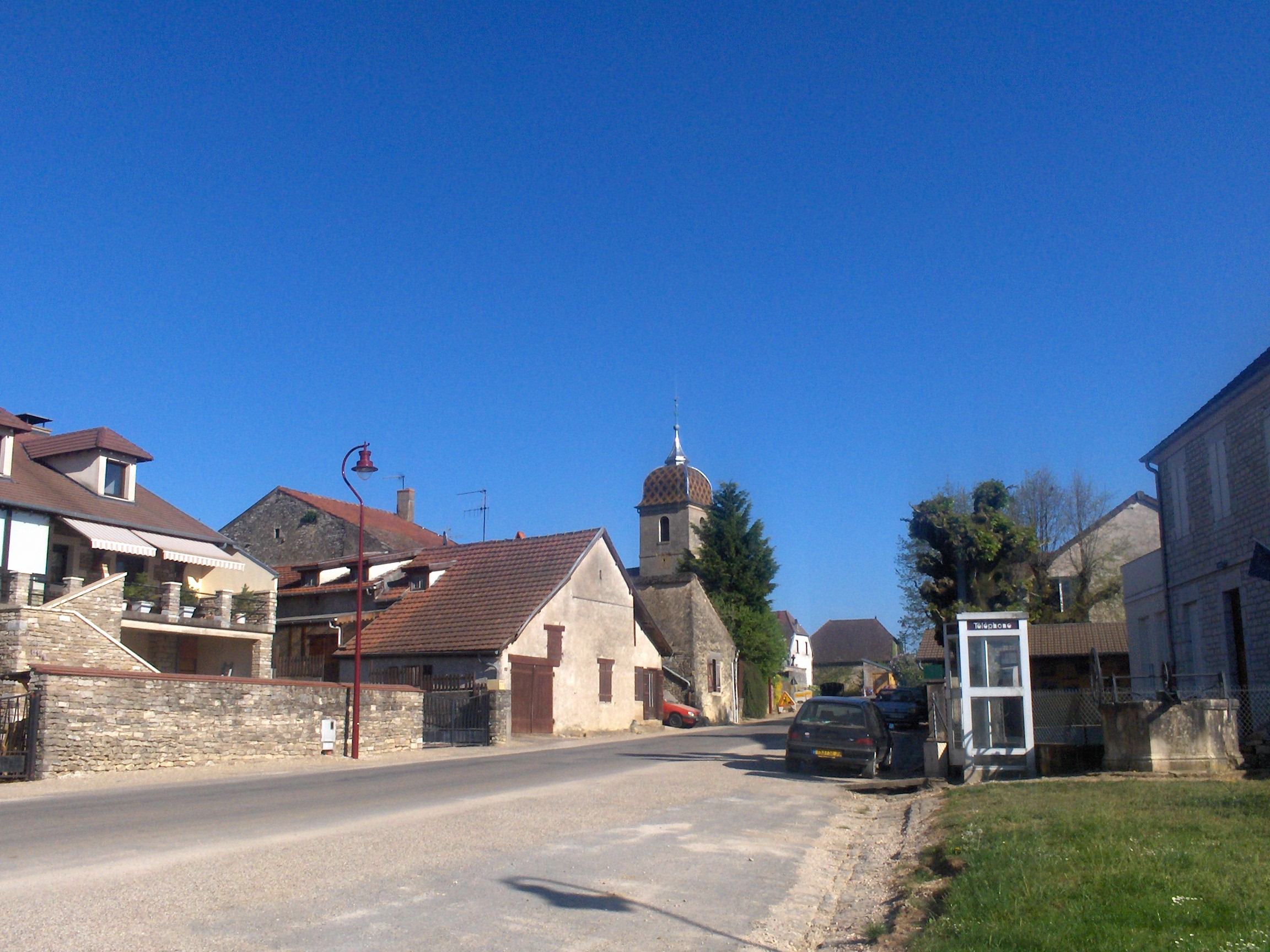 Lavangeot village Jura France